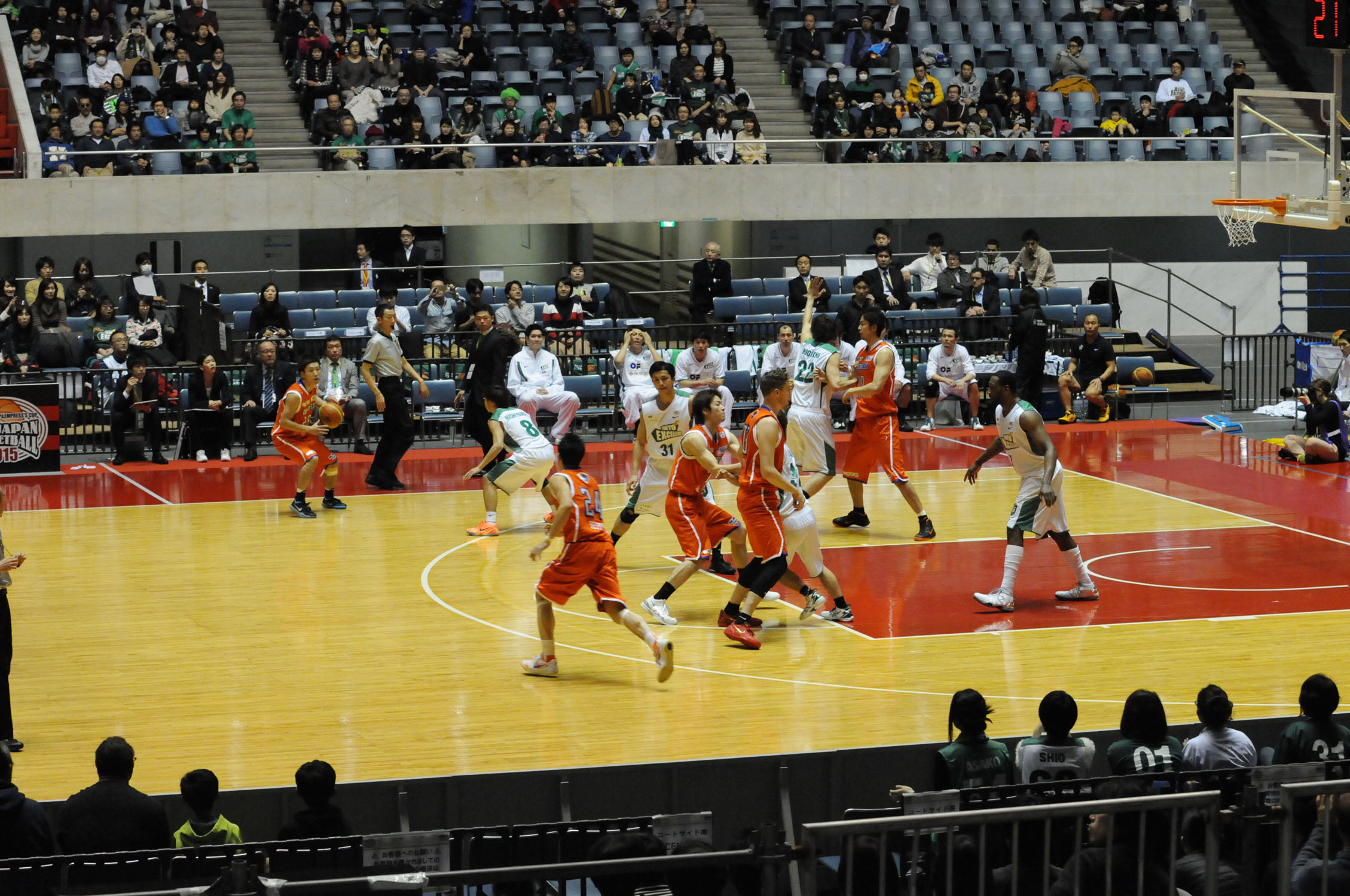 2015年全日本総合バスケットボール選手権大会準々決勝、東京エクセレンス対広島ドラゴンフライズ。代々木第一体育館で。